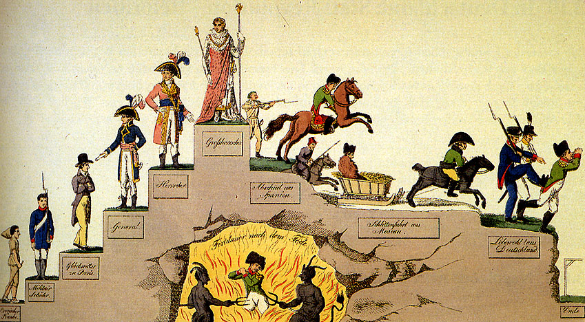 Napoleons Lebenslauf. Eine kolorierte Radierung nach einer deutschen Karikatur.